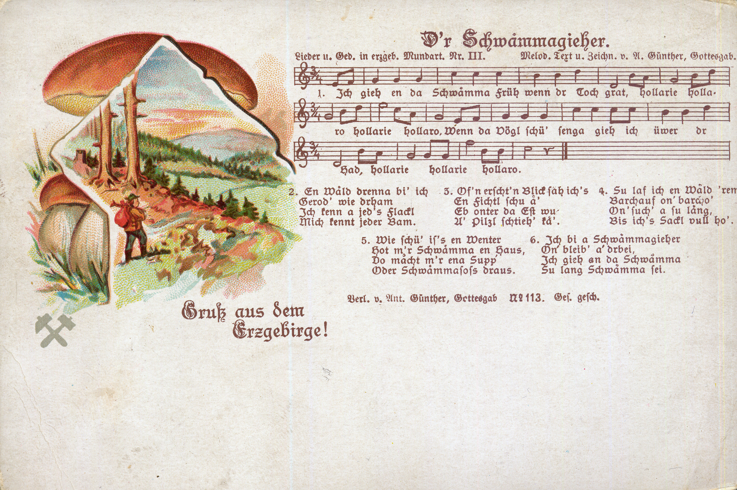 Eine der ersten Liedkarten als Farblithographie, III - D'r Schwammagieher - 1902